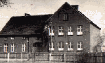 Dawny budynek szkoły podstawowej przy ulicy Rogozińskiej w Budzyniu